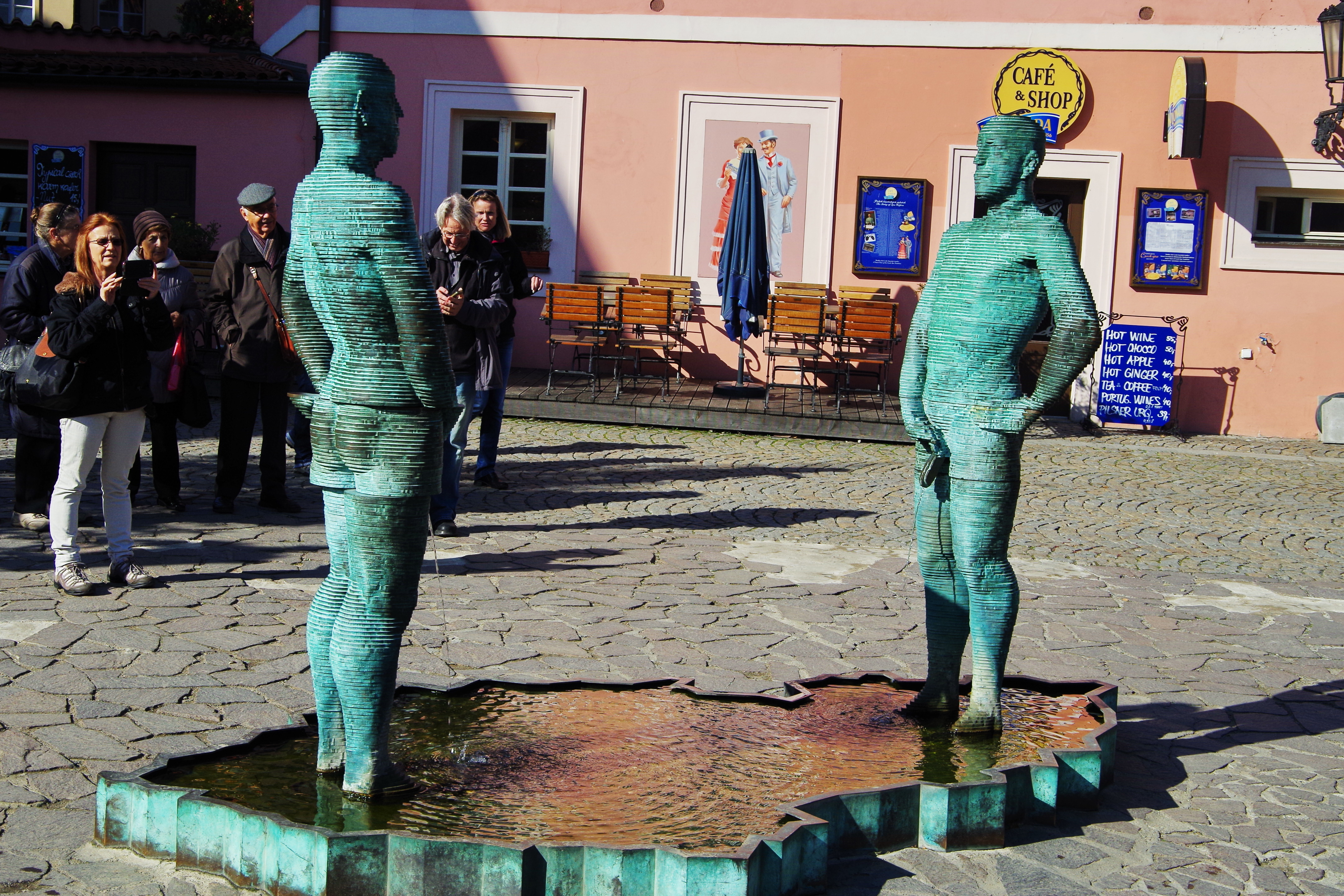 Brunnen vor Kafka-Museum